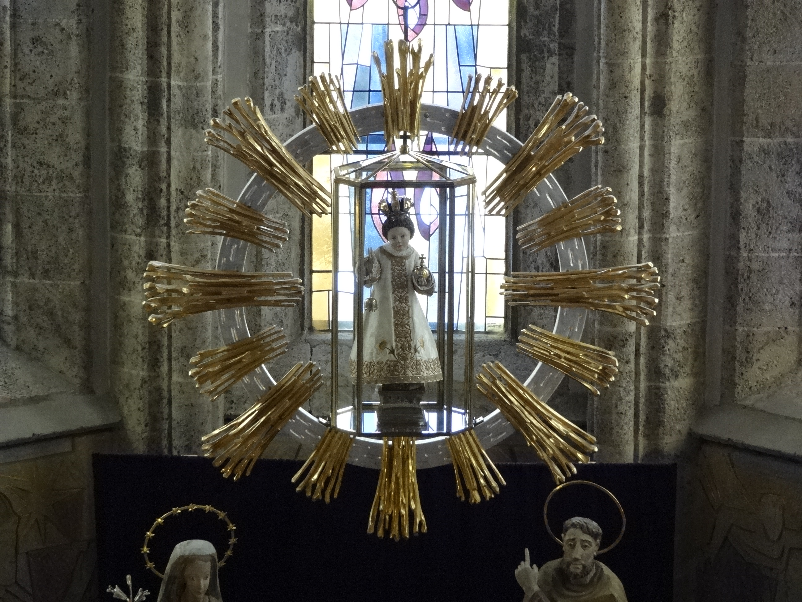 Saints Peter and Paul Church (Filzmoos) Filzmooser Kindl